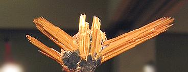 Fotografía de Pablo Alberto Salguero Quiles